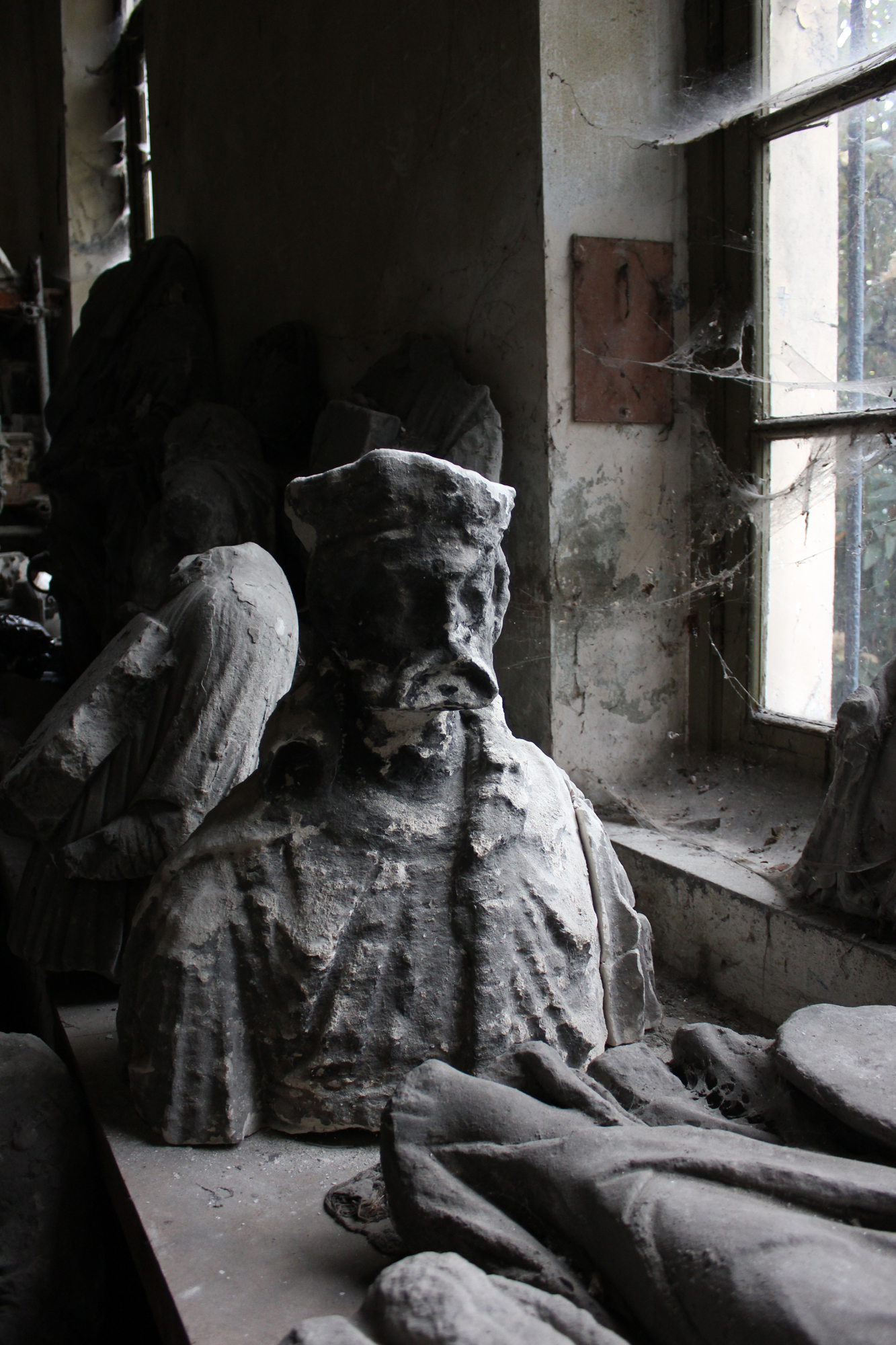 Statue de roi non identifié conservé dans l'orangerie de l'abbatiale Saint-Denis.